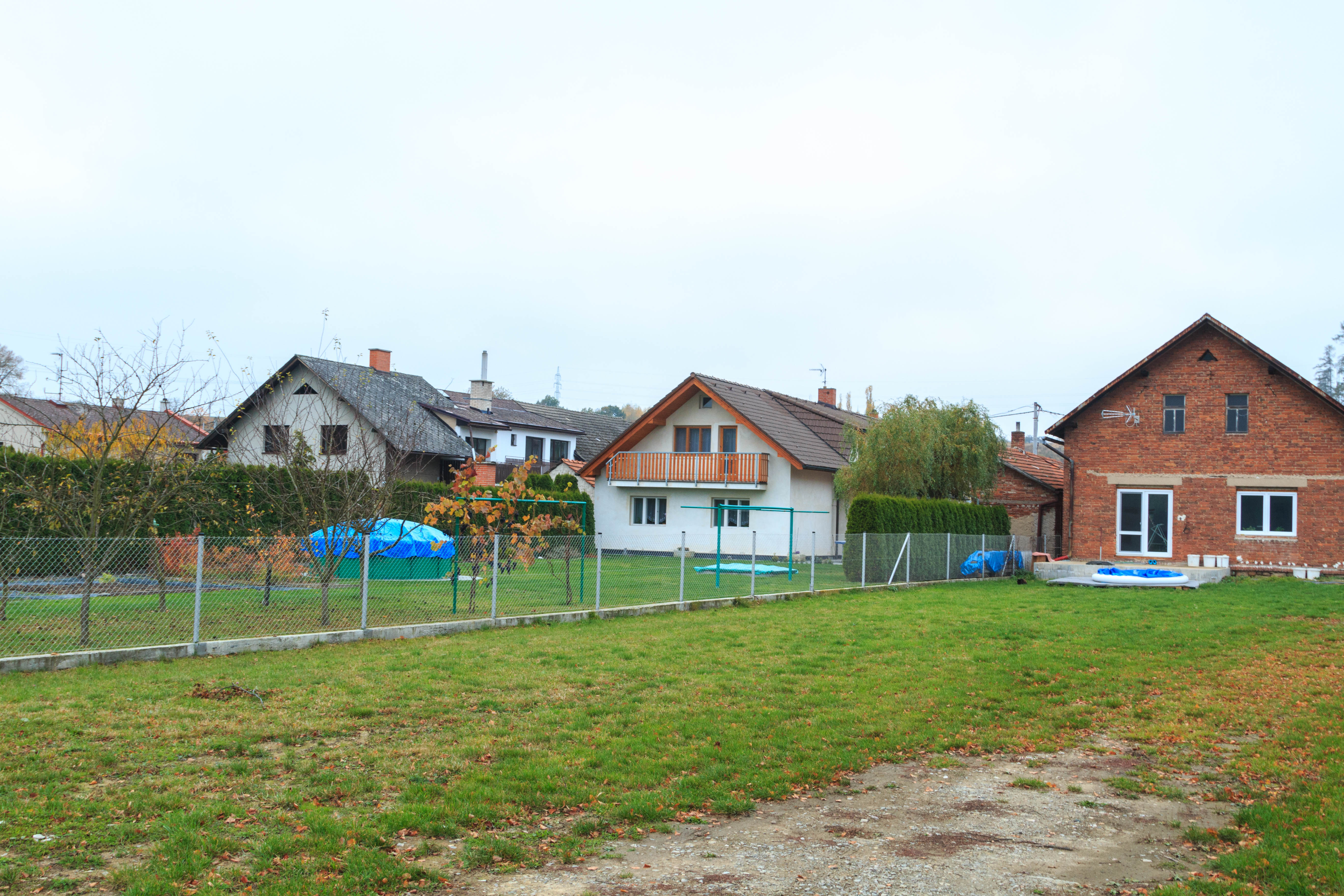 Lokot - čp. 73